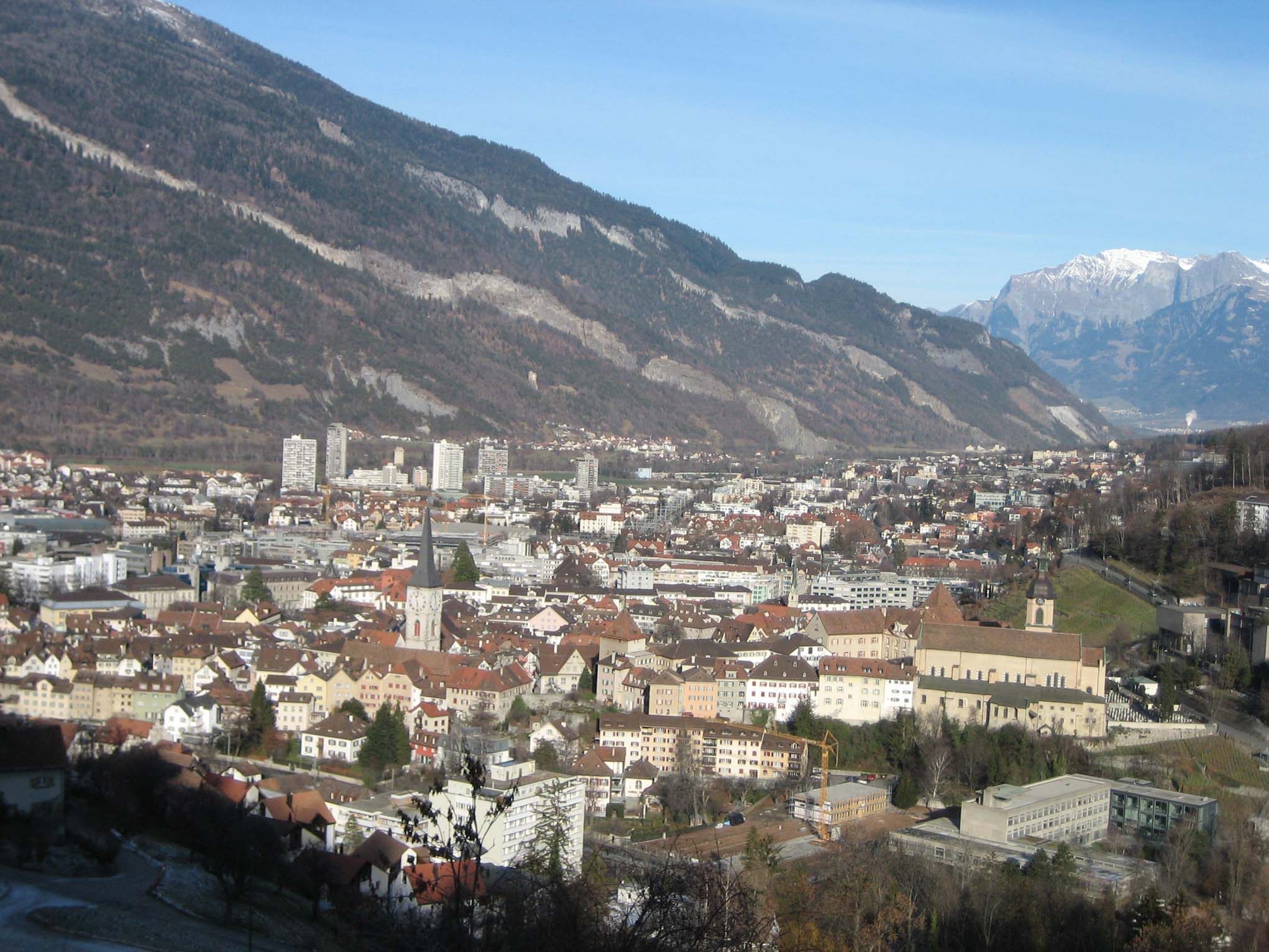 Nordseite: Chur im Dezember 2006